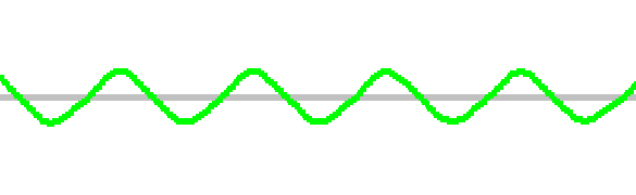 피콜로나 플루트의 파형